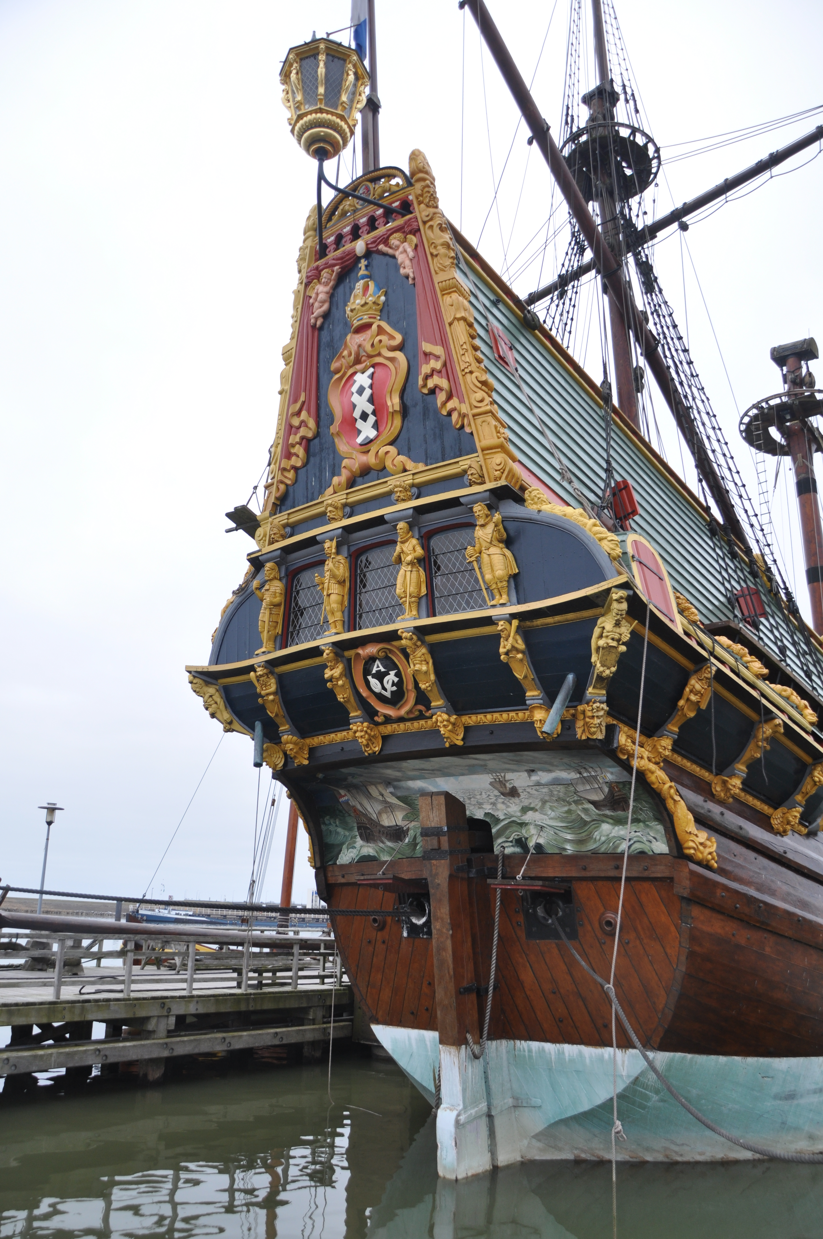 De Batavia aan de werf